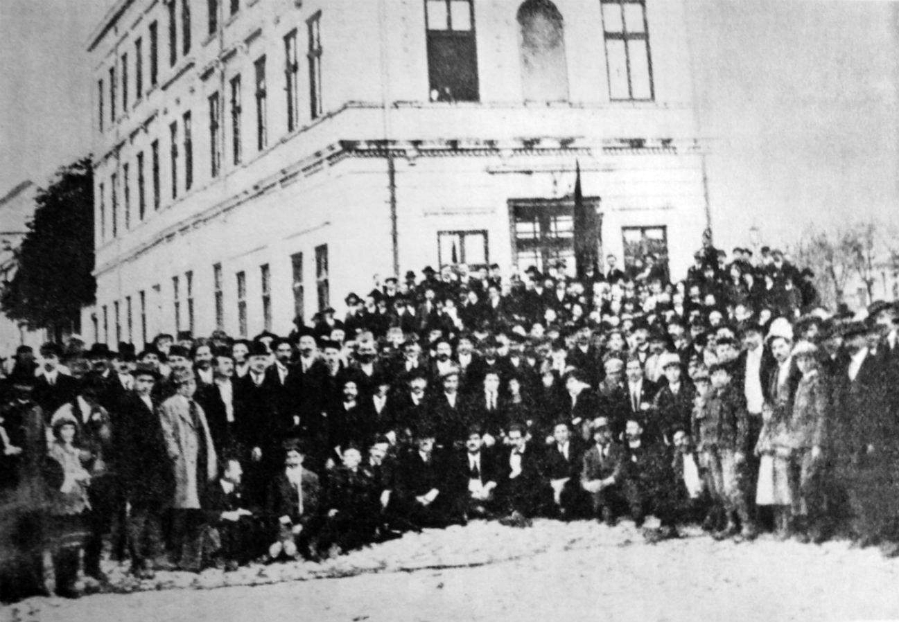 Делегати Првог конгреса СРПЈ(к) испред зграде некадашњег хотела Славија, Београд 1919. година.